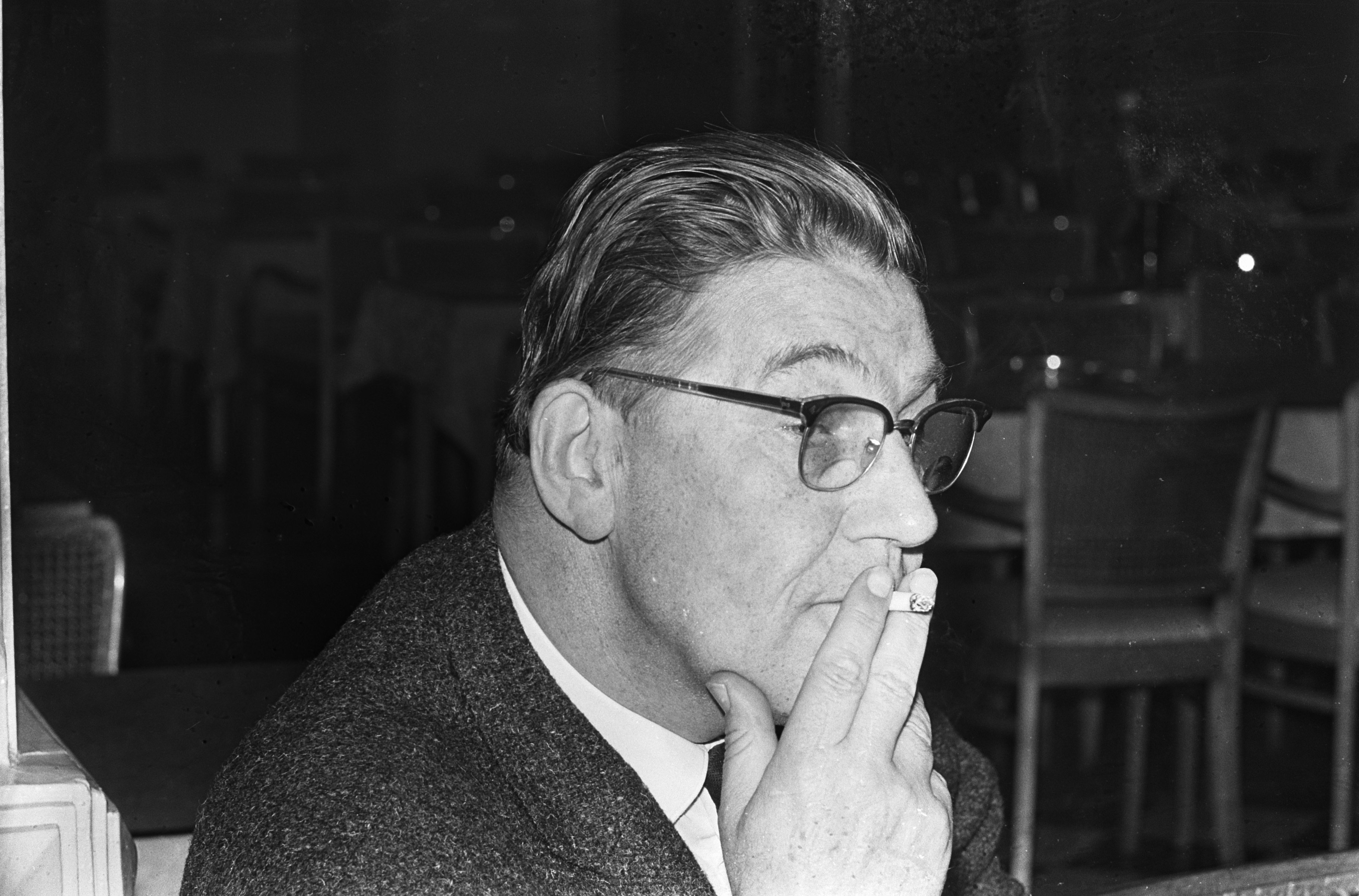 Collectie / Archief : Fotocollectie Anefo Reportage / Serie : [ onbekend ] Beschrijving : H. M. van Randwijk (kop) Datum : 4 maart 1965 Trefwoorden : KOPPEN Persoonsnaam : H. M. van Randwijk Fotograaf : Koch, Eric / Anefo Auteursrechthebbende : Nationaal Archief Materiaalsoort : Negatief (zwart/wit) Nummer archiefinventaris : bekijk toegang 2.24.01.05 Bestanddeelnummer : 917-5018